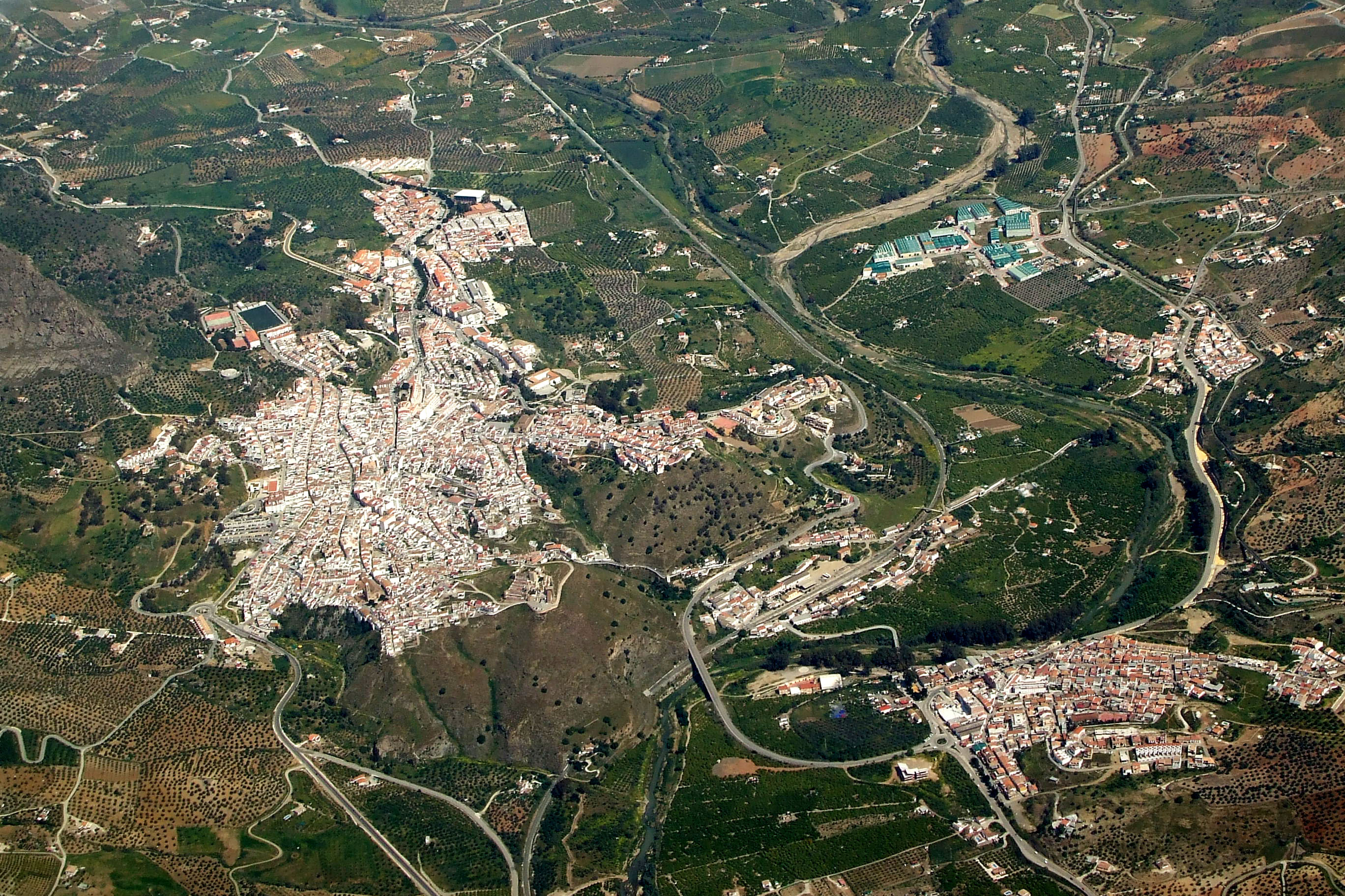 Vista aérea de Álora, Málaga, España